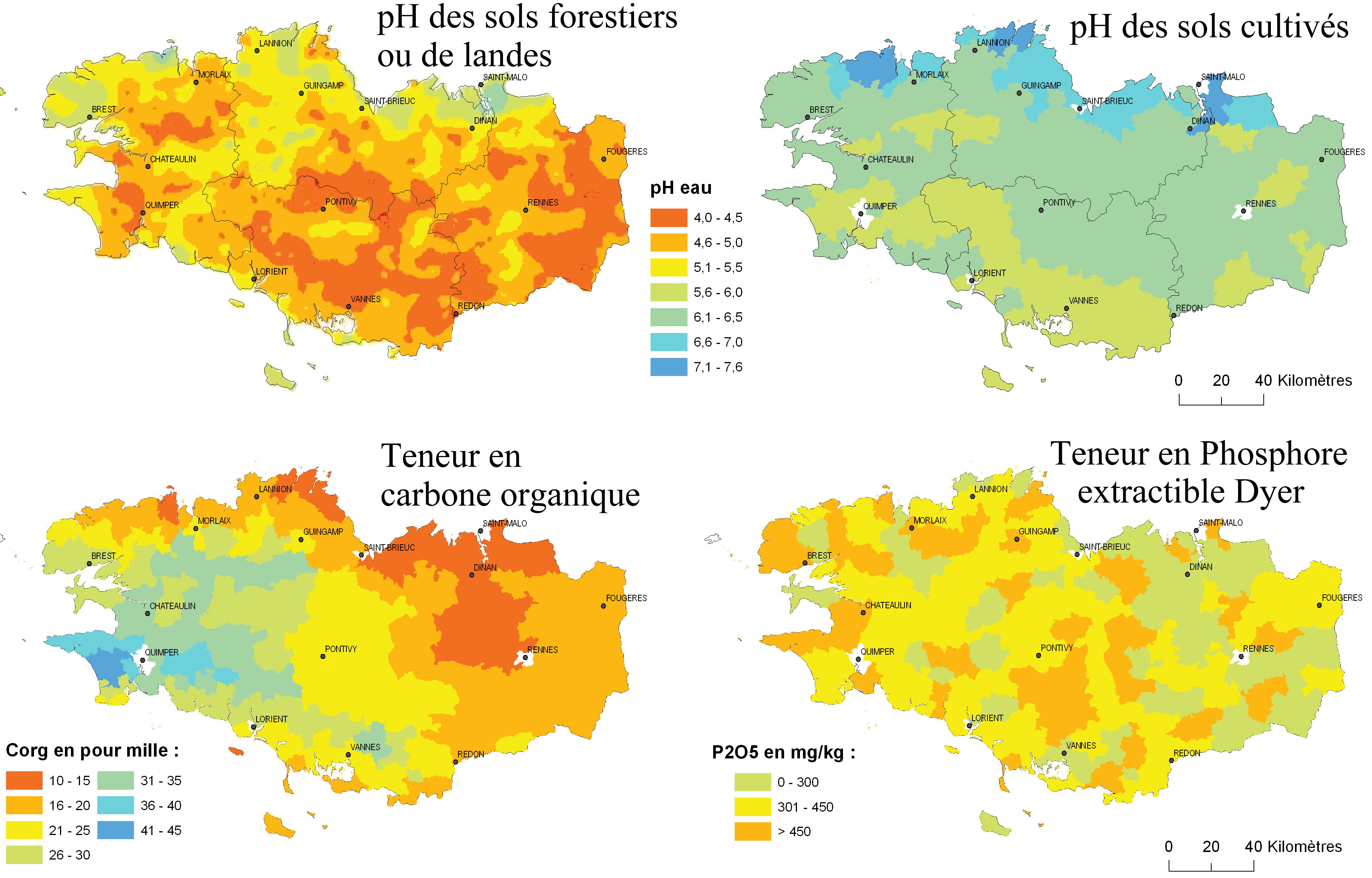 La carte du pH des sols forestiers (Gegout et al., 2006, © accord AgroParisTech-Engref (UMR LERFOB) - IFN n°2007-CPA-2-072) est obtenue par bioindication à partir de l’analyse de la végétation. Les trois autres cartes représentent des médianes cantonales d’analyses de terre couvrant la période 2000 à 2004 (Lemercier et al., 2006).